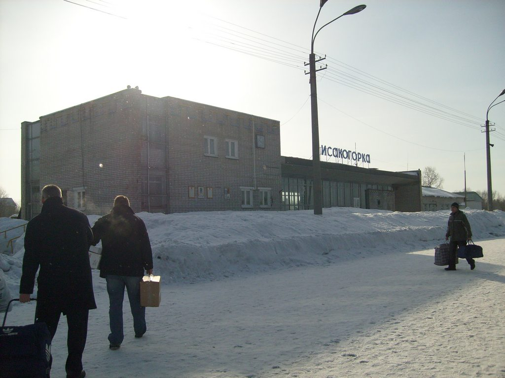 Станция Исакогорка Северной Железной Дороги